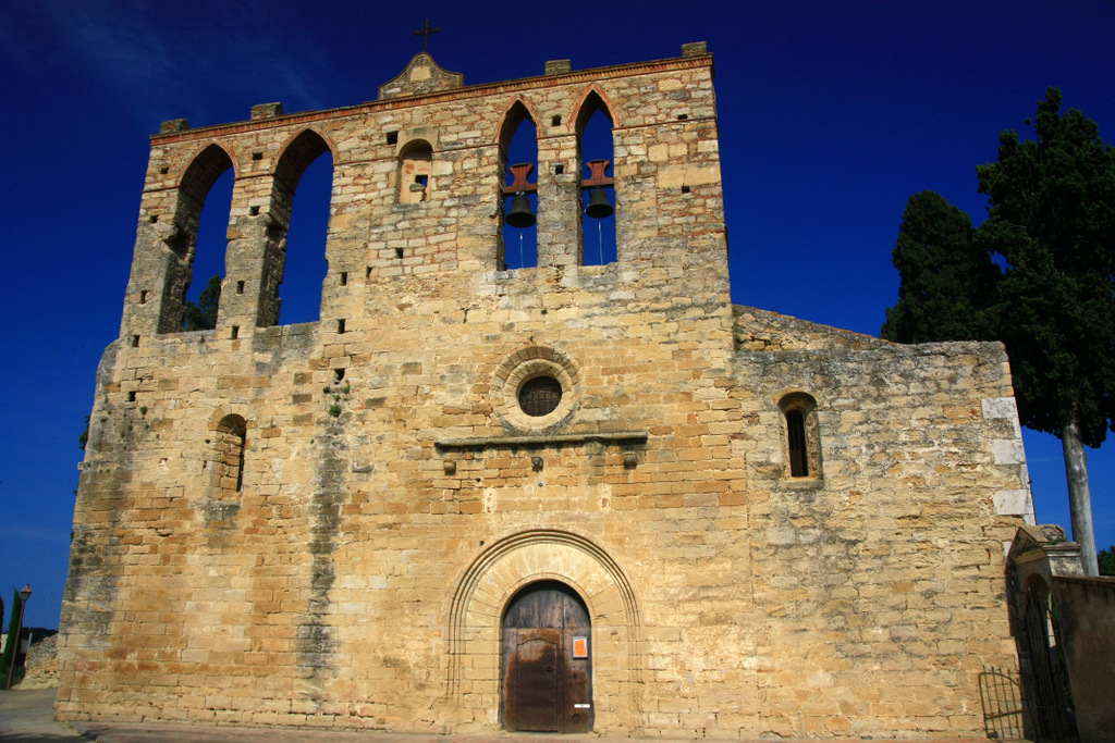 Peratallada, l'eglise